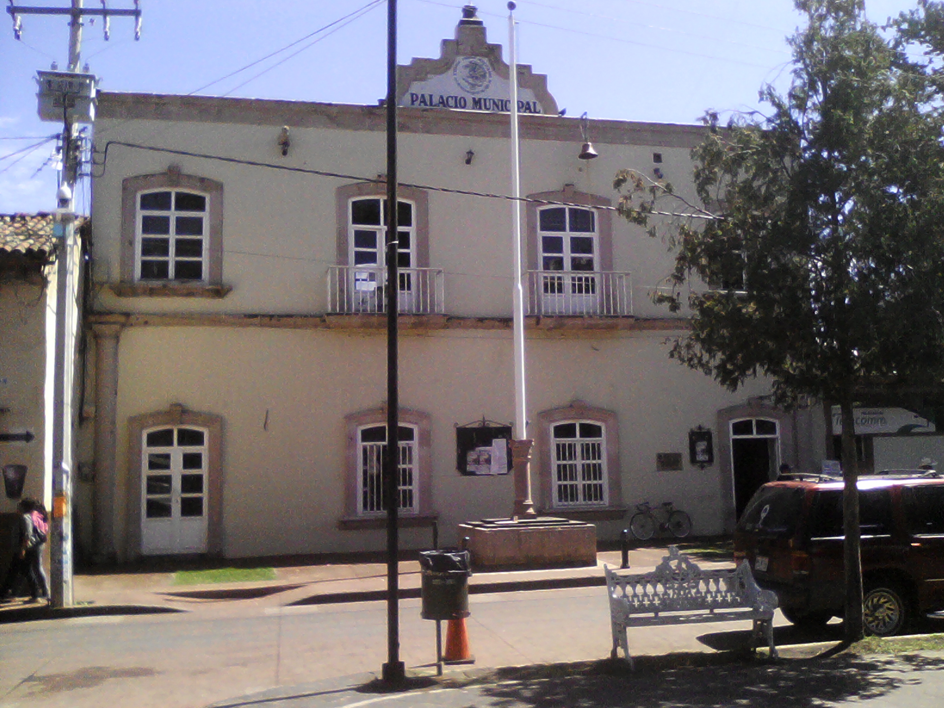 Palacio municipal de Coeneo de la Libertad